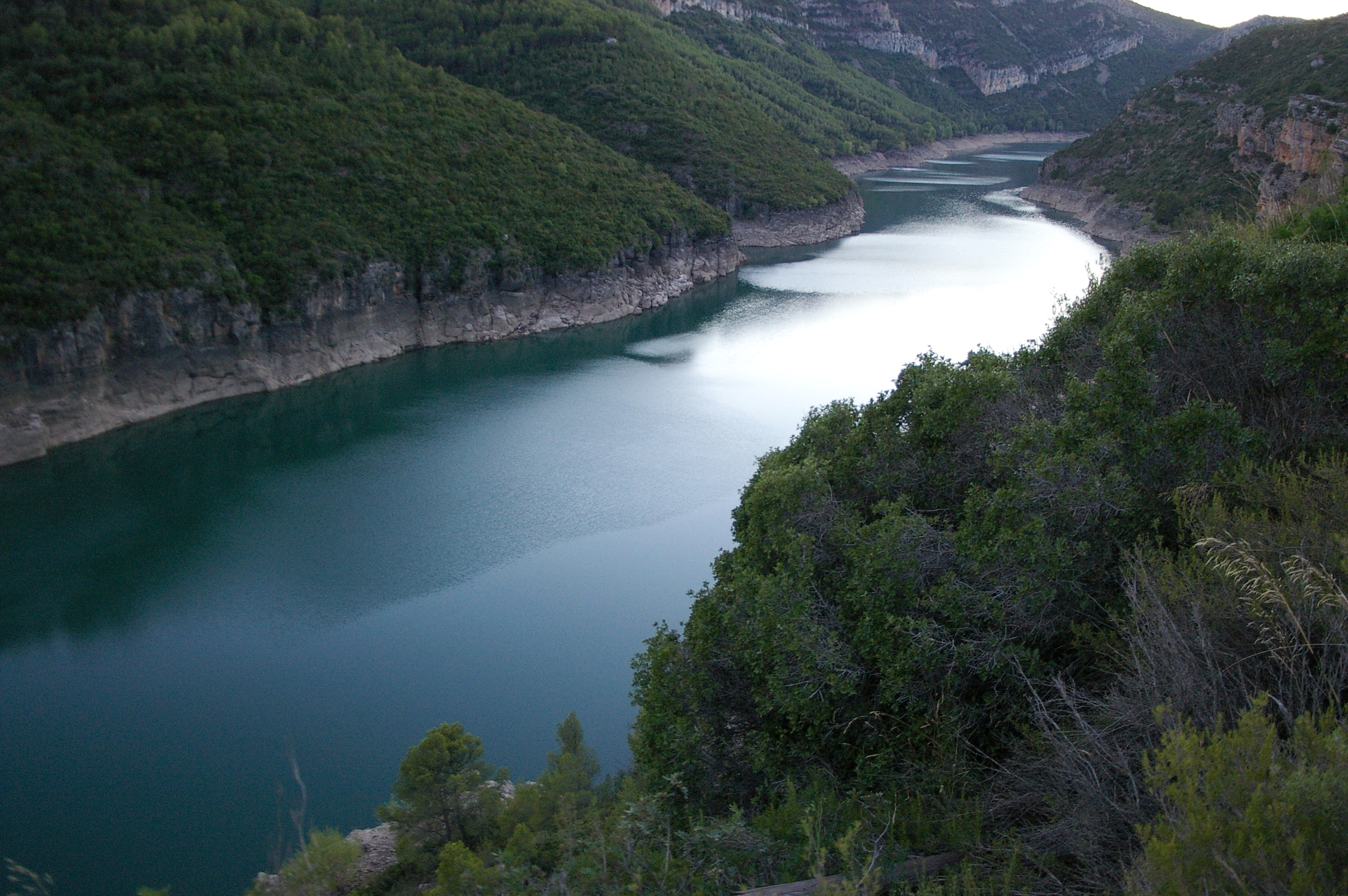 Riu Noguera Pallaresa, en el pantà de Camarasa (Lleida, Catalunya).